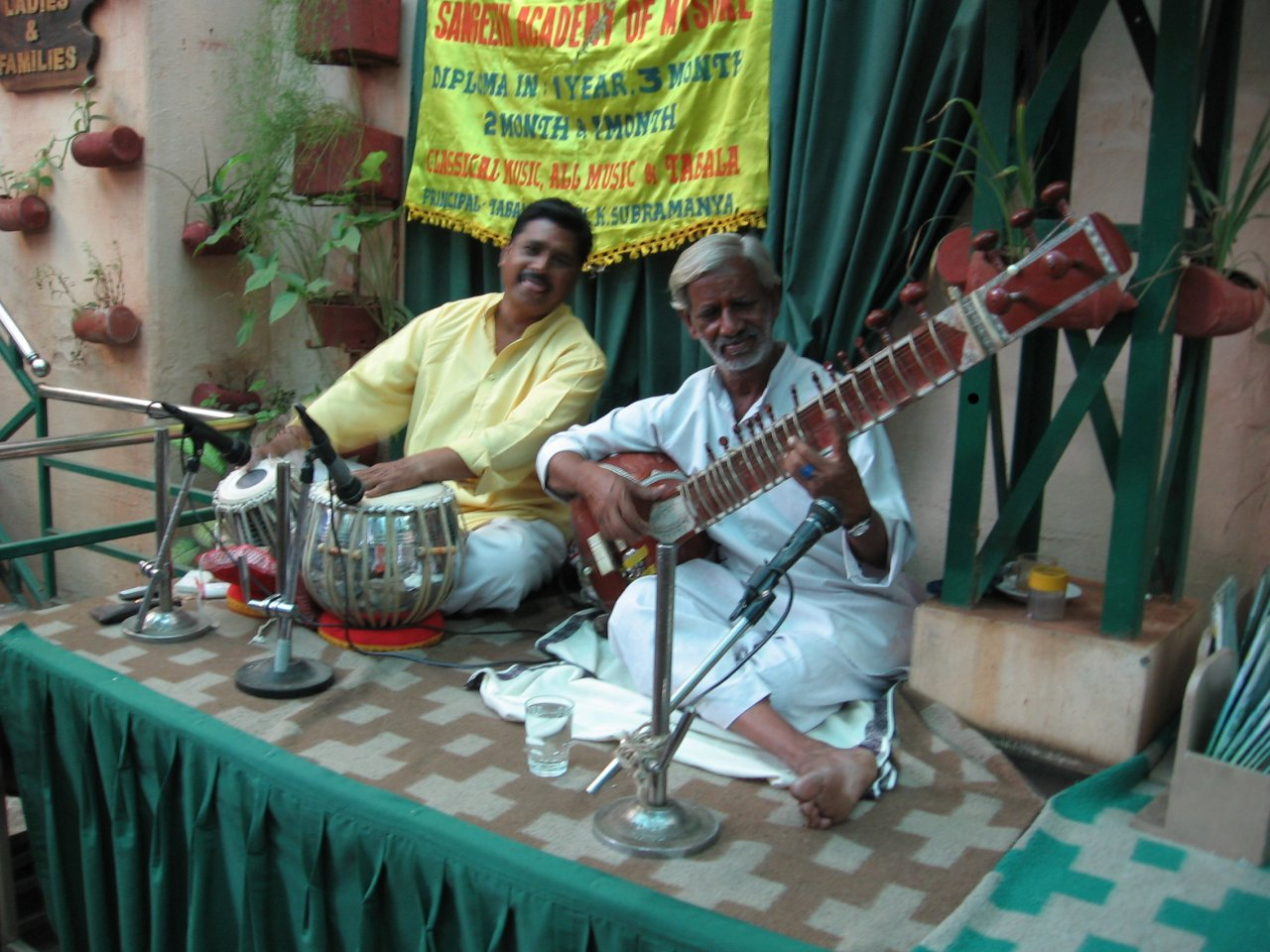 O estilo musical chamado Carnatic tem origens no sul da Índia, na região chamada karnataka (de onde deriva o nome), e é um estilo de música clássica. Originalmente estas músicas eram parte dos rituais Hinduistas, e eram comuns a todo o país. Porém, após as invasões islâmicas no norte (séculos 12 e 13), o estilo musical daquela região sofreu forte influência da cultura arábica. No restaurante do hotel onde fiquei hospedado na cidade de Mysore, essa dupla da foto tocava por horas. Era incrível ver como eles estavam felizes e se divertindo enquanto tocavam. Para ter uma idéia de como é este estilo musical, basta dar uma olhada na expressão de paz que está estampada na cara do indiano tocando cítara. Preciso visitar uma loja de cds...